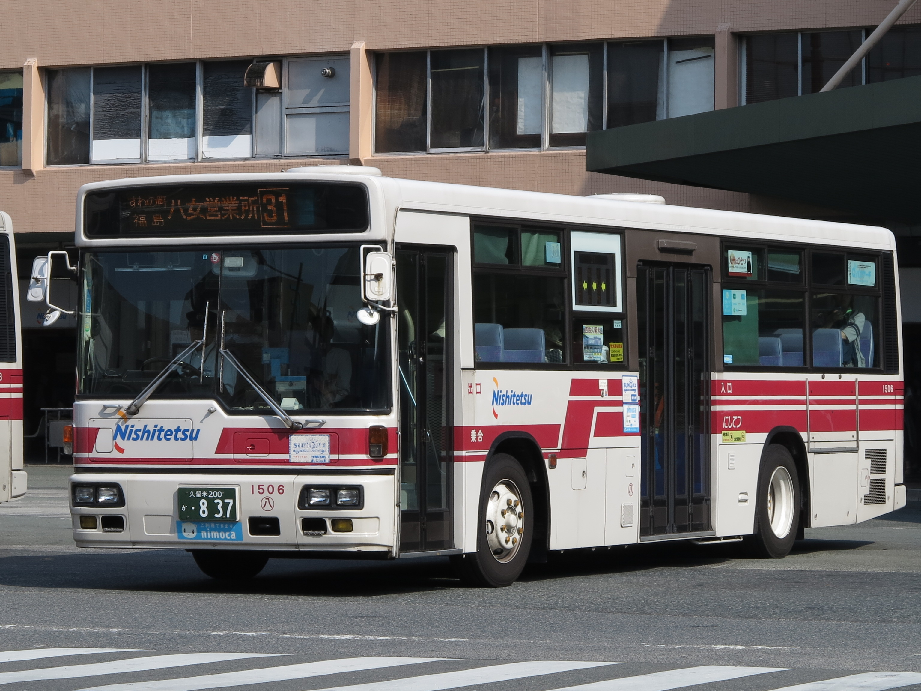 西鉄バス1506号車 久留米200か837（西鉄バス久留米・八女車庫所属）